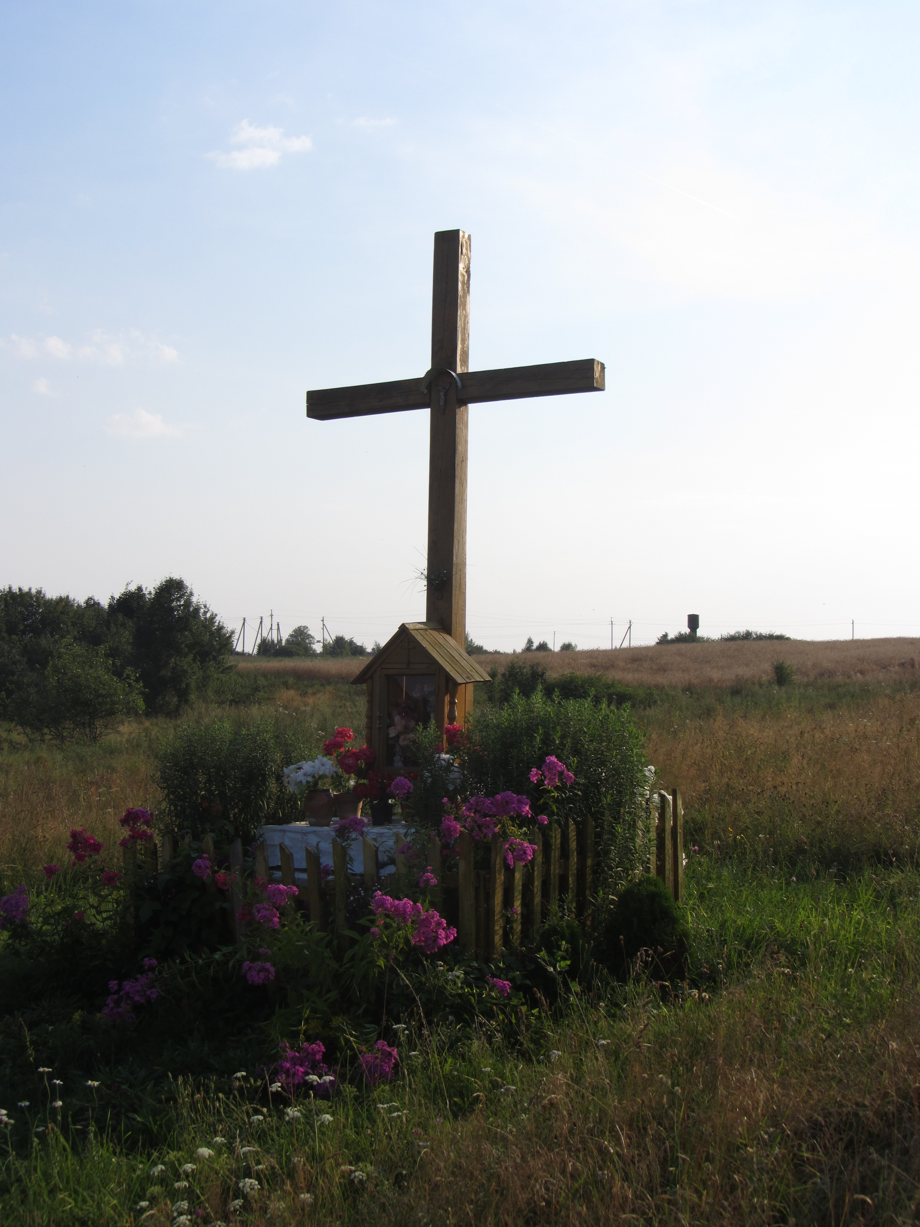 Žemaitėliai 13182, Lithuania